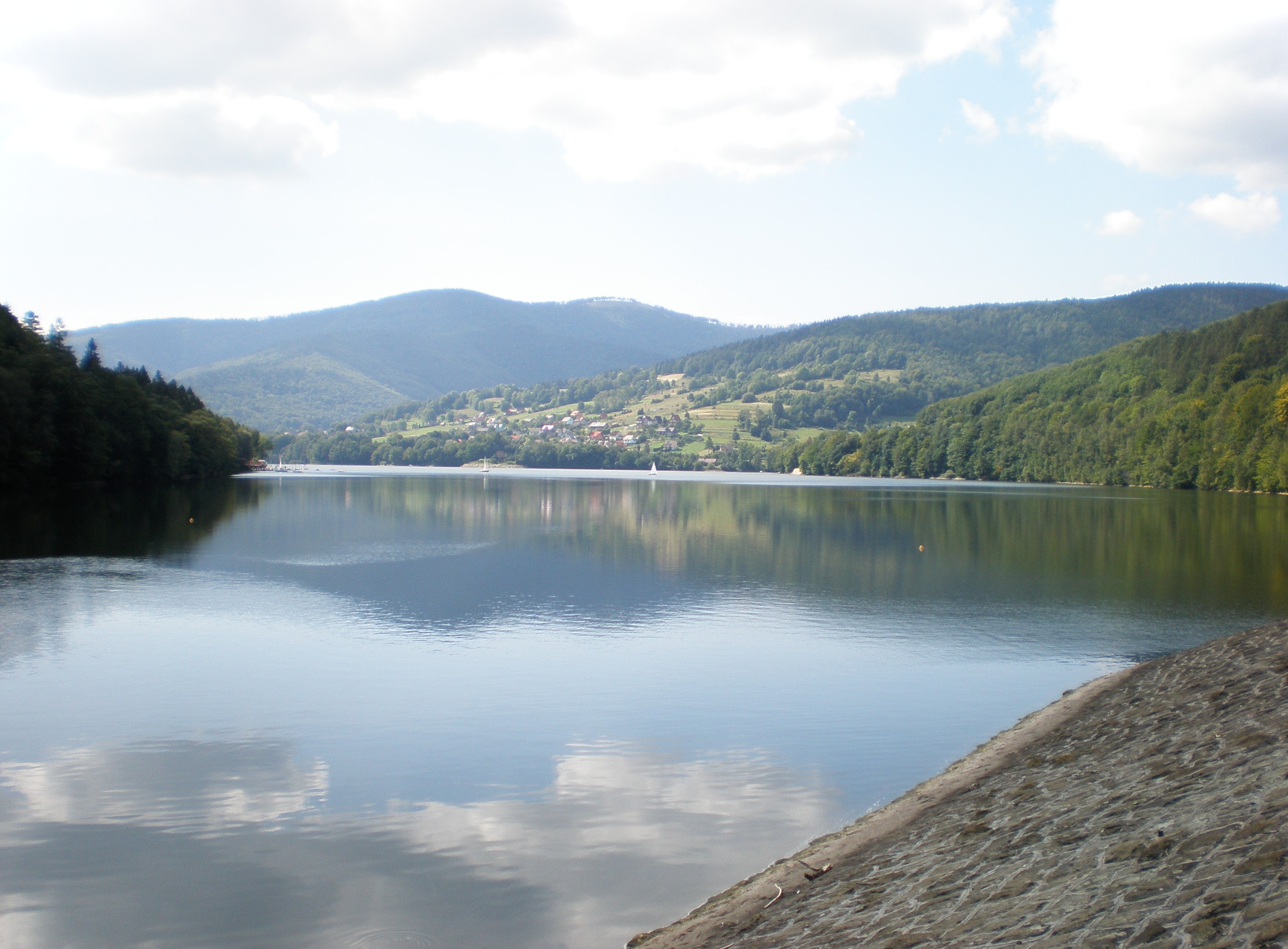 Jezioro Międzybrodzkie